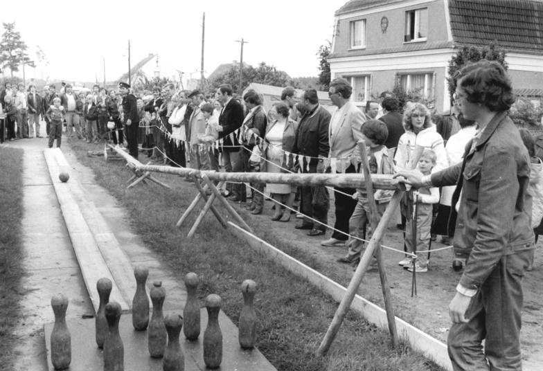 Emstal, Kegeln auf dem Dorffest Zum Beitrag: Kugelbrot vom Backofenplatz - Neues Volksfest in Emstal begründet ADN-ZB Sturm - 22.6.84 - bb. Dicht umlagert war beim Backofenfest in Emstal, das am Sonntag nach Pfingsten wieder viele Gäste in die kleine Gemeinde nahe Lehnin im Kreis Brandenburg lockte, auch die Kegelbahn. (Hierzu gehören die Fotos 1984-0622-300N-304N!)